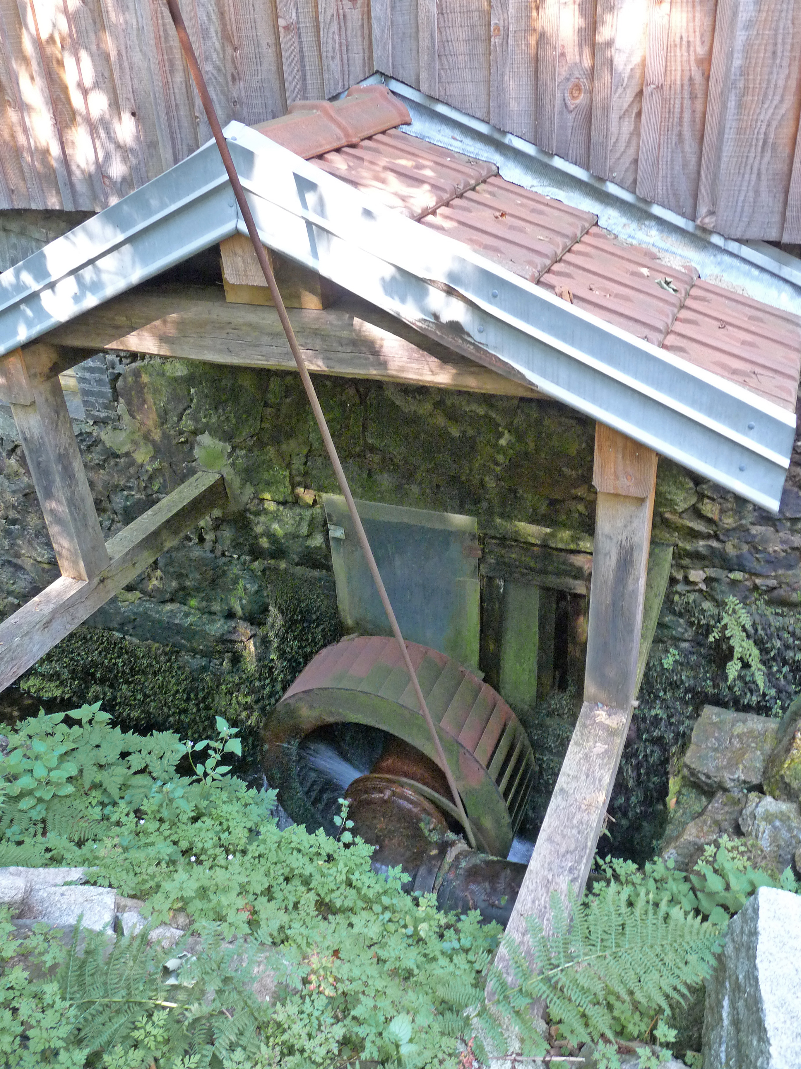 Défilé de Straiture (Vosges) : Scierie du Lançoir. Turbine Canson-Montgolfier